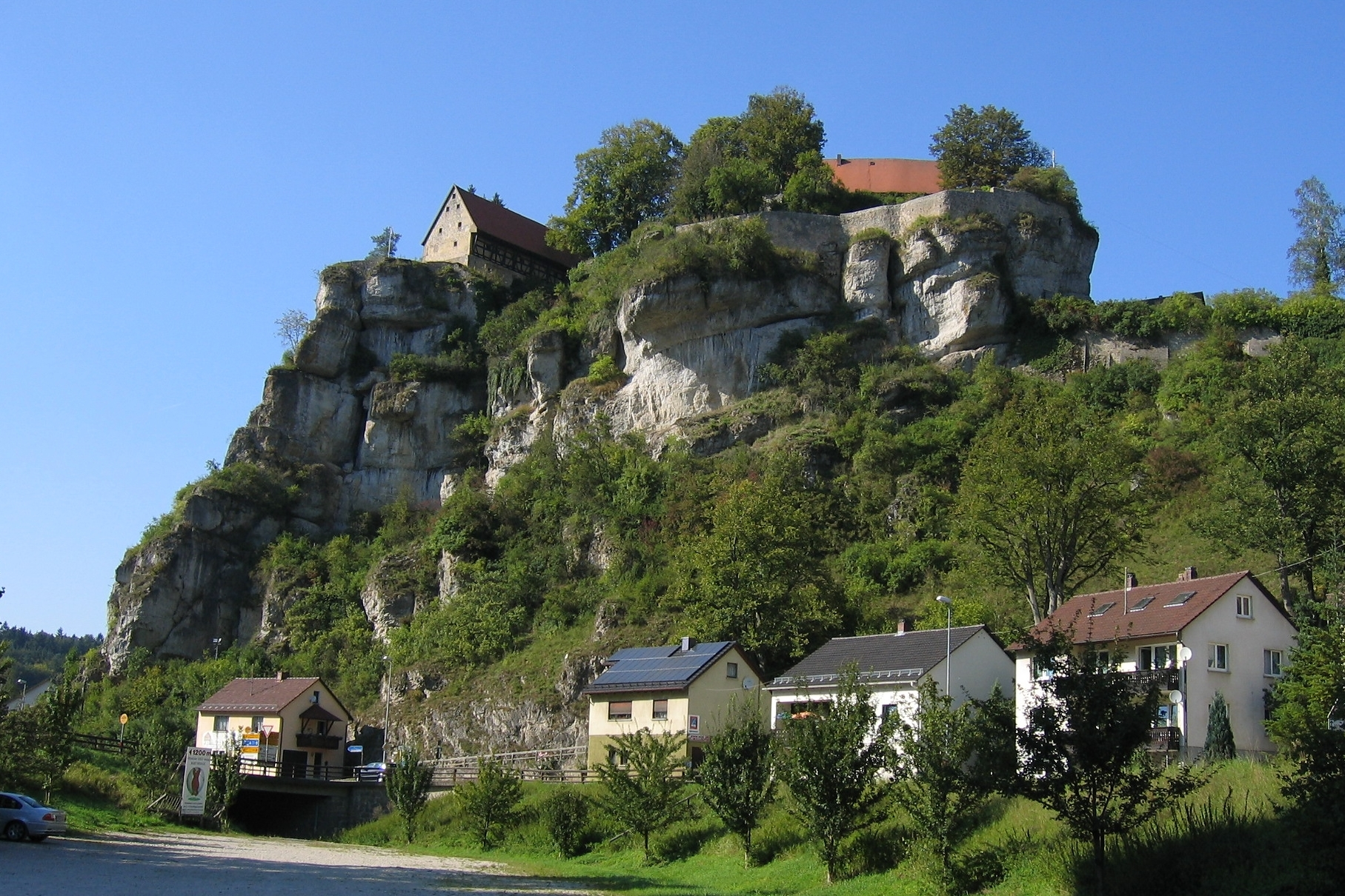 Burg Pottenstein -Südansicht- in Pottenstein